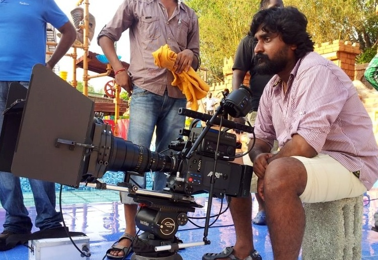 Arbhindu Saaraa